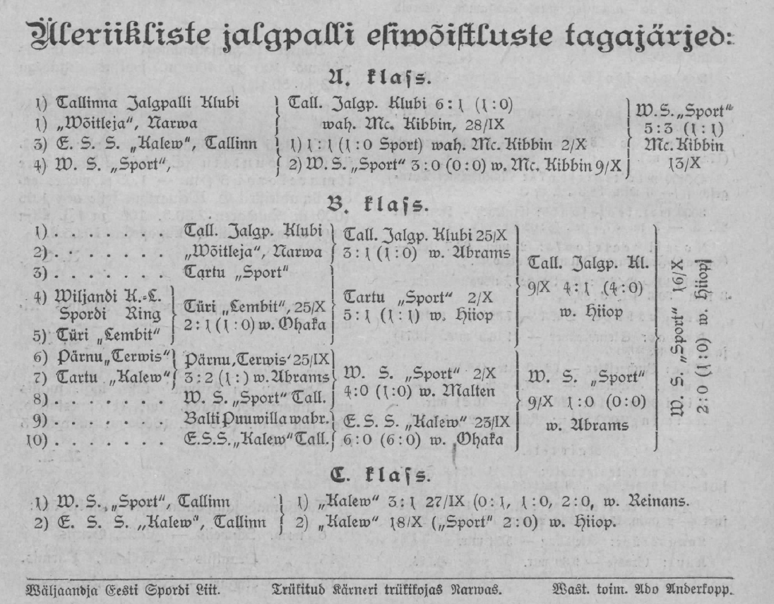 Üleriikliste jalgpalli esiwõistluste tagajärjed